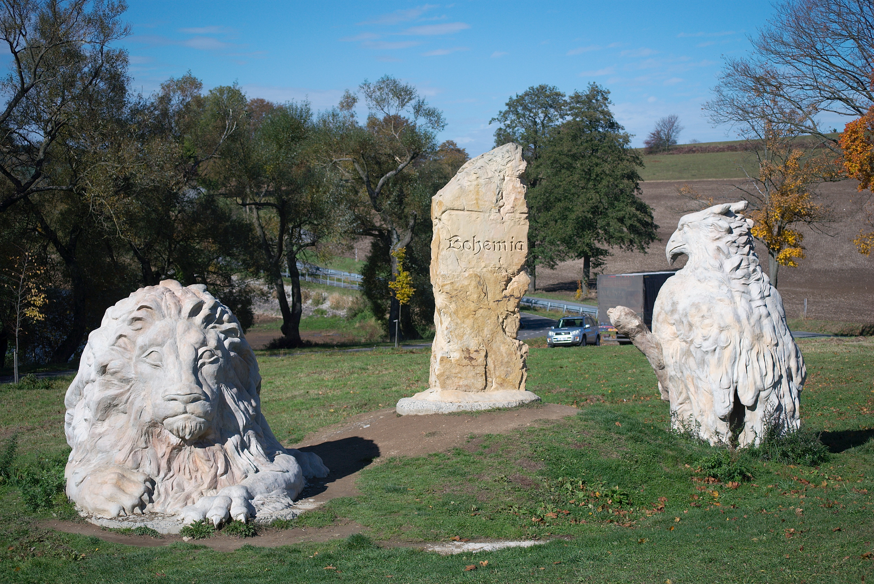 Sousoší "Hraniční kámen" od Michala Olšiaka, vyfotografované od jihu. Toto sousoší se nachází asi 100 metrů jižně od skutečné historické zemské hranice Čech a Moravy, nedaleko břehu vodní nádrže Pilská. Na snímku vidíme Českého lva, který se dívá směrem na Moravu, dále Moravskou orlici, která se dívá směrem ke hranici Čech a Moravy, a mezi nimi je dále umístěn "hraniční kámen", na němž je na jižní straně umístěn latinský název Čech (Bohemia) a na severní straně latinský název Moravy (Moravia), upozorňující na vstup do příslušné země.